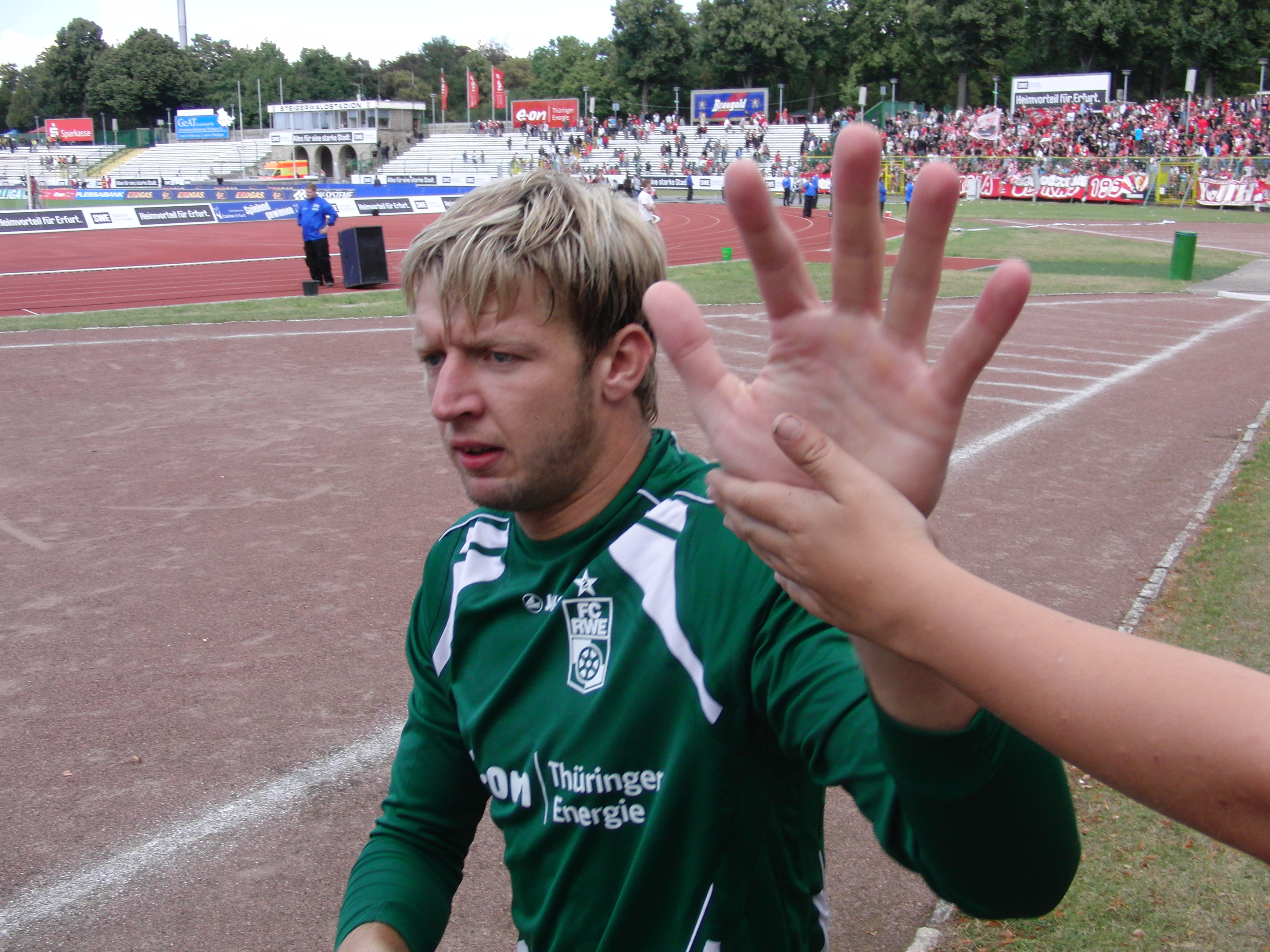 Dirk Orlishausen im Steigerwaldstadion, Erfurt